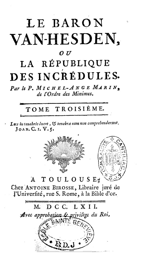 Michel-Ange Marin: Le Baron Van Hesden ou la république des incrédules, 3. Band, Toulouse 1762, Titelseite